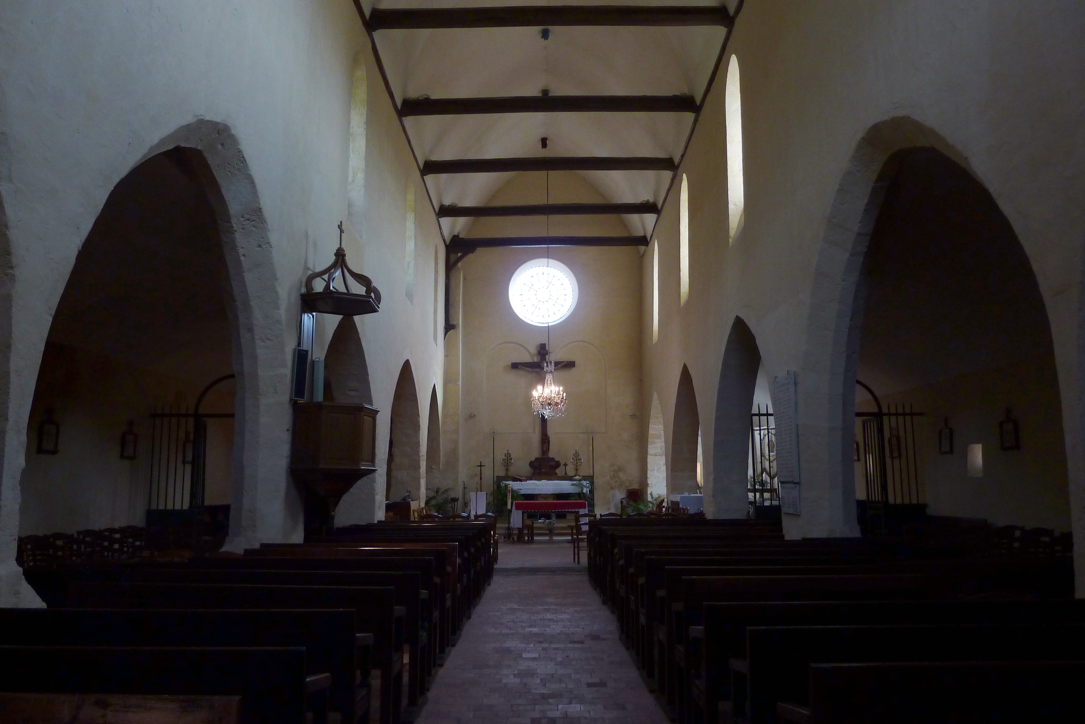 Katholische Pfarrkirche Saint-Germain in La Grande-Paroisse im Département Seine-et-Marne in der Region Île-de-France (Frankreich), Blick zum Chor